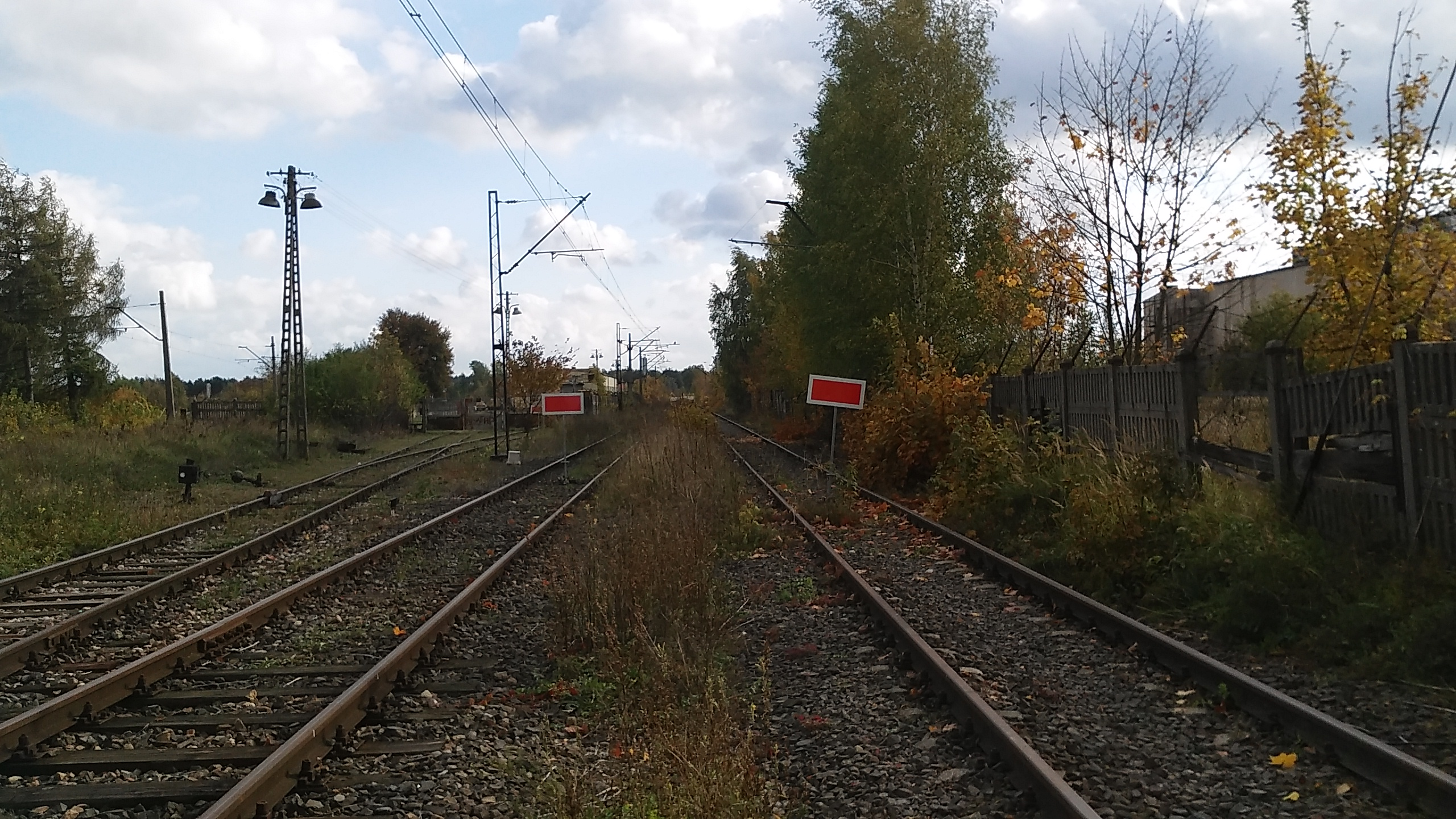 Białystok Starosielce - północny kraniec linii kolejowych nr 515 (L) i 516 (P). Linie są nieprzejezdne z uwagi na budowę tunelu drogowego pod torami w ciągu ulicy Klepackiej w Białymstoku. Widok od północy.